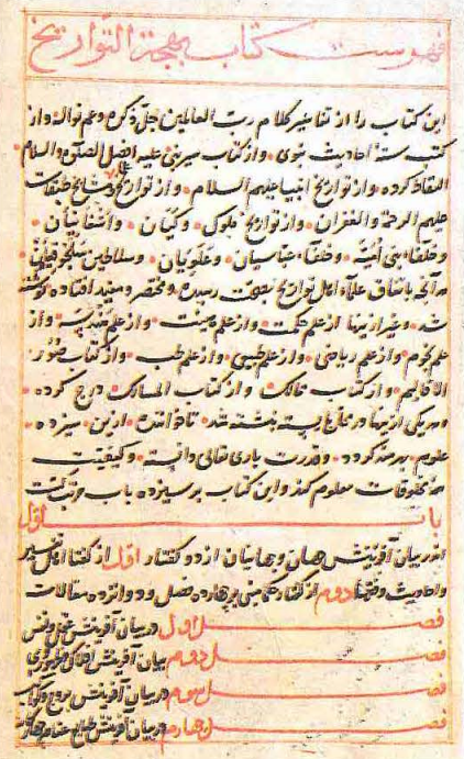 Şükrullâh'ın Behcetü't Tevârîh isimli eserinin Nuruosmaniye Kütüphanesi nüshasının ilk sayfası.